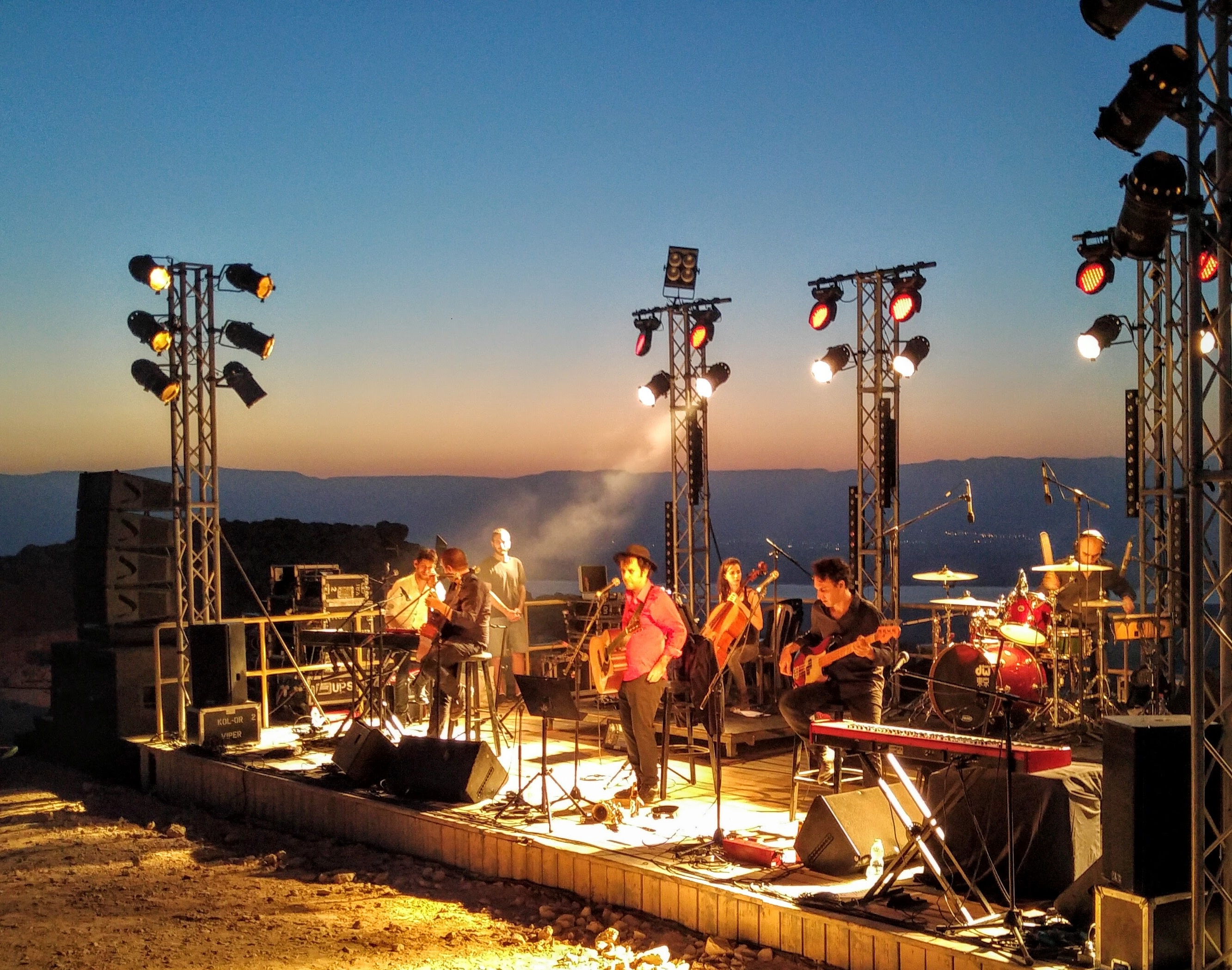 להקת כנסיית השכל במופע זריחה במצדה, סוכות 2015